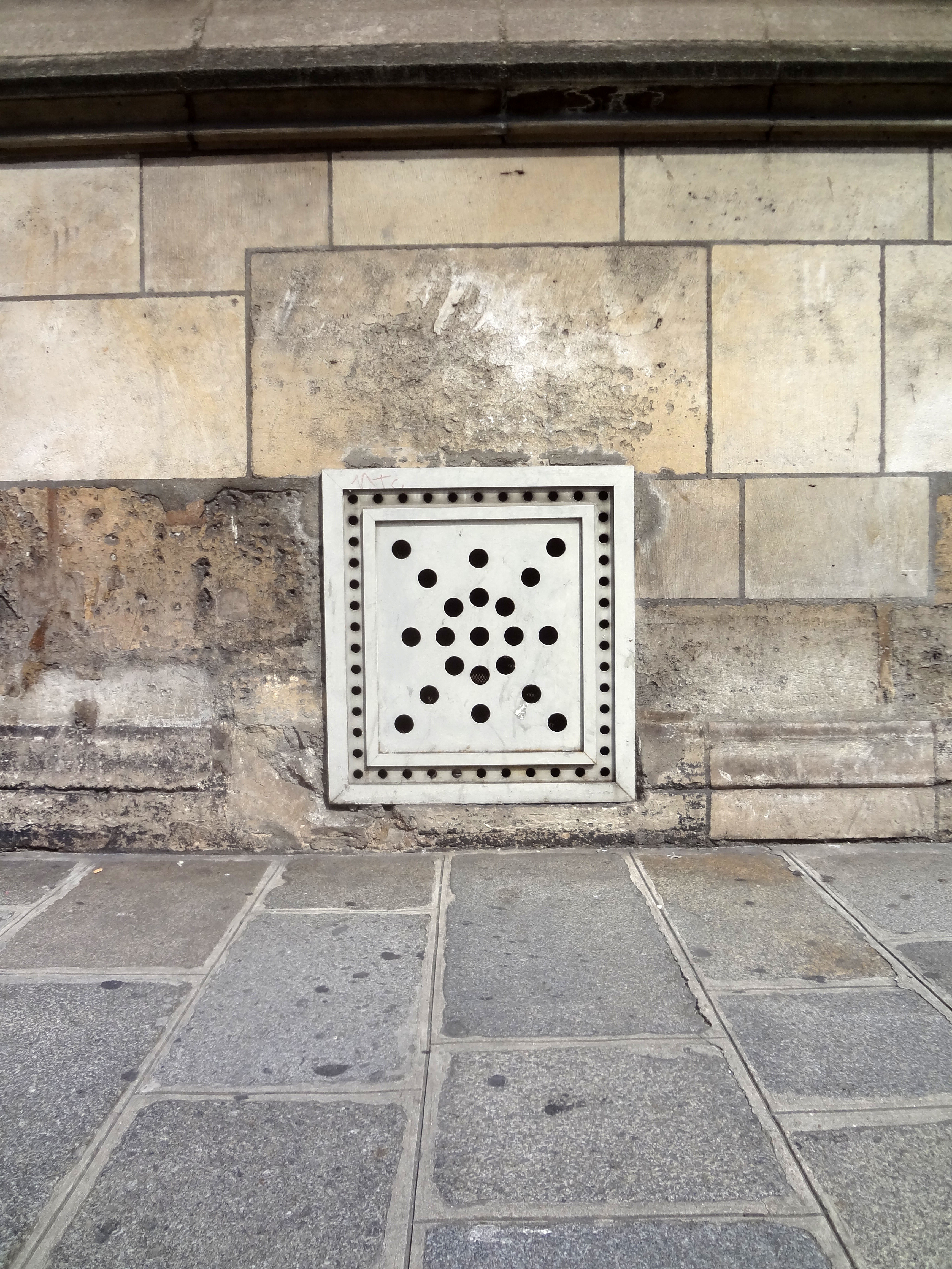 Soupirail moderne, Paroisse Saint-Nicolas des Champs, rue Saint-Martin, Paris